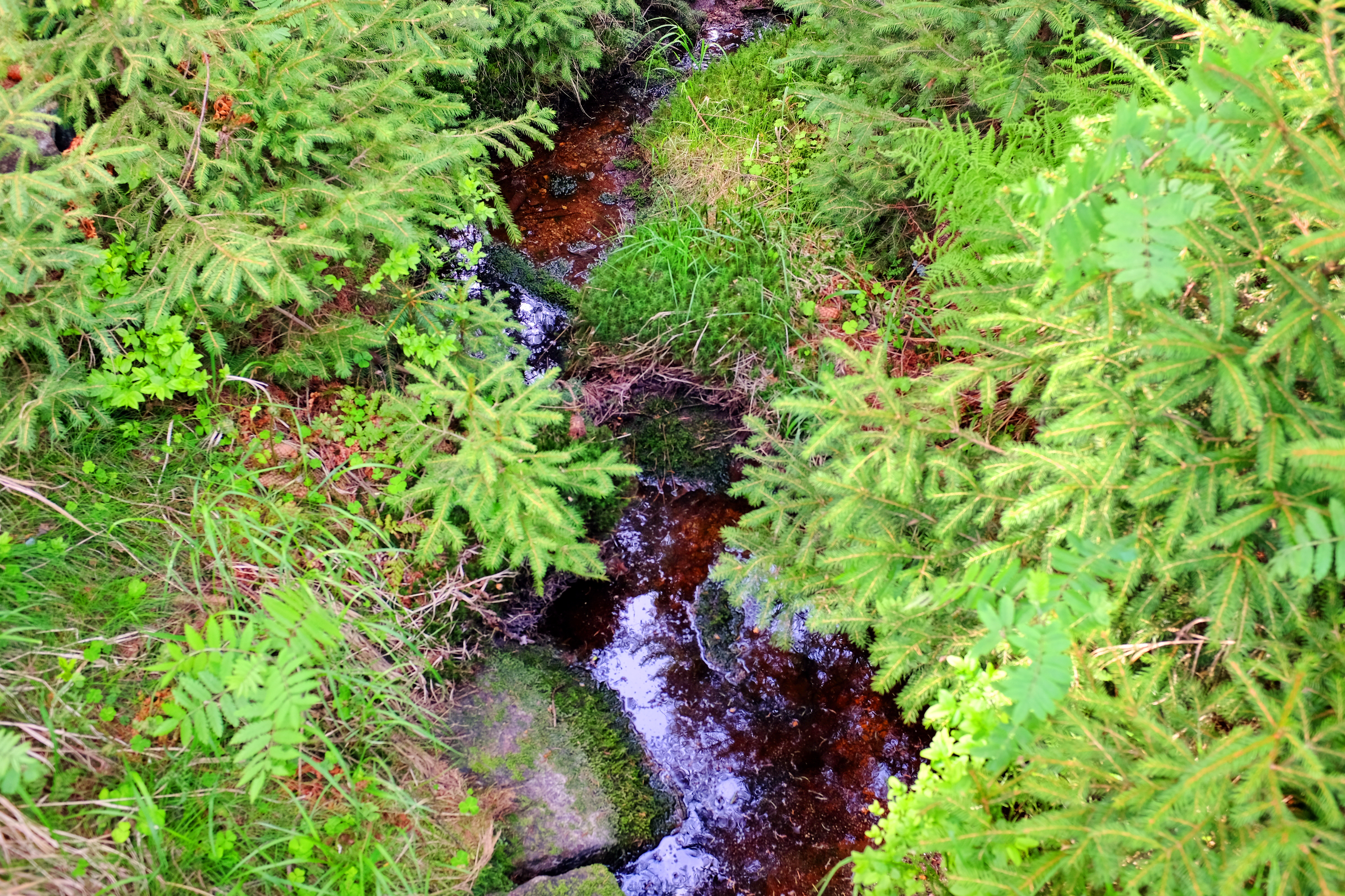 Oldřichovský potok, přítok Limnice, v místě pod přírodní rezervací Oceán v Krušných horách, okres Karlovy Vary